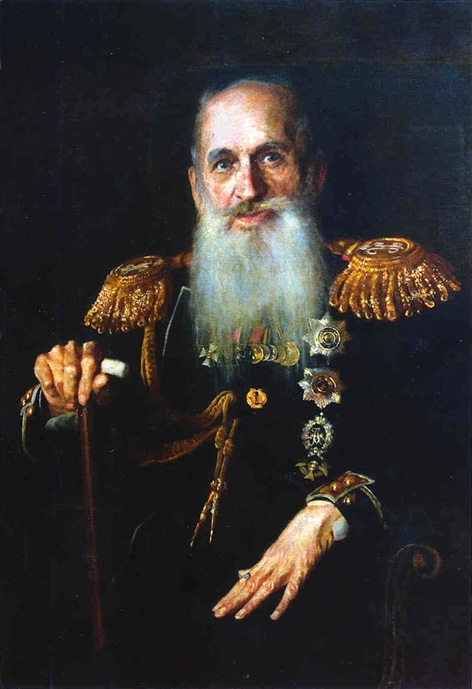 Портрет Олександра Григоровича Строганова